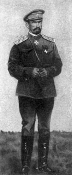 Русский военачальник, генерал от инфантерии Л. Г. Корнилов (1870—1918)